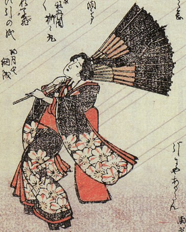 Ushirogami (後髪) from the Kyōka Hyaku Monogatari (狂歌百物語)